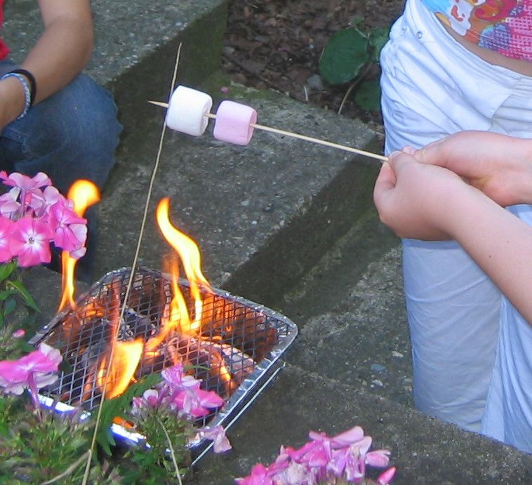 Grillade de marshmallows sur un barbecue jetable